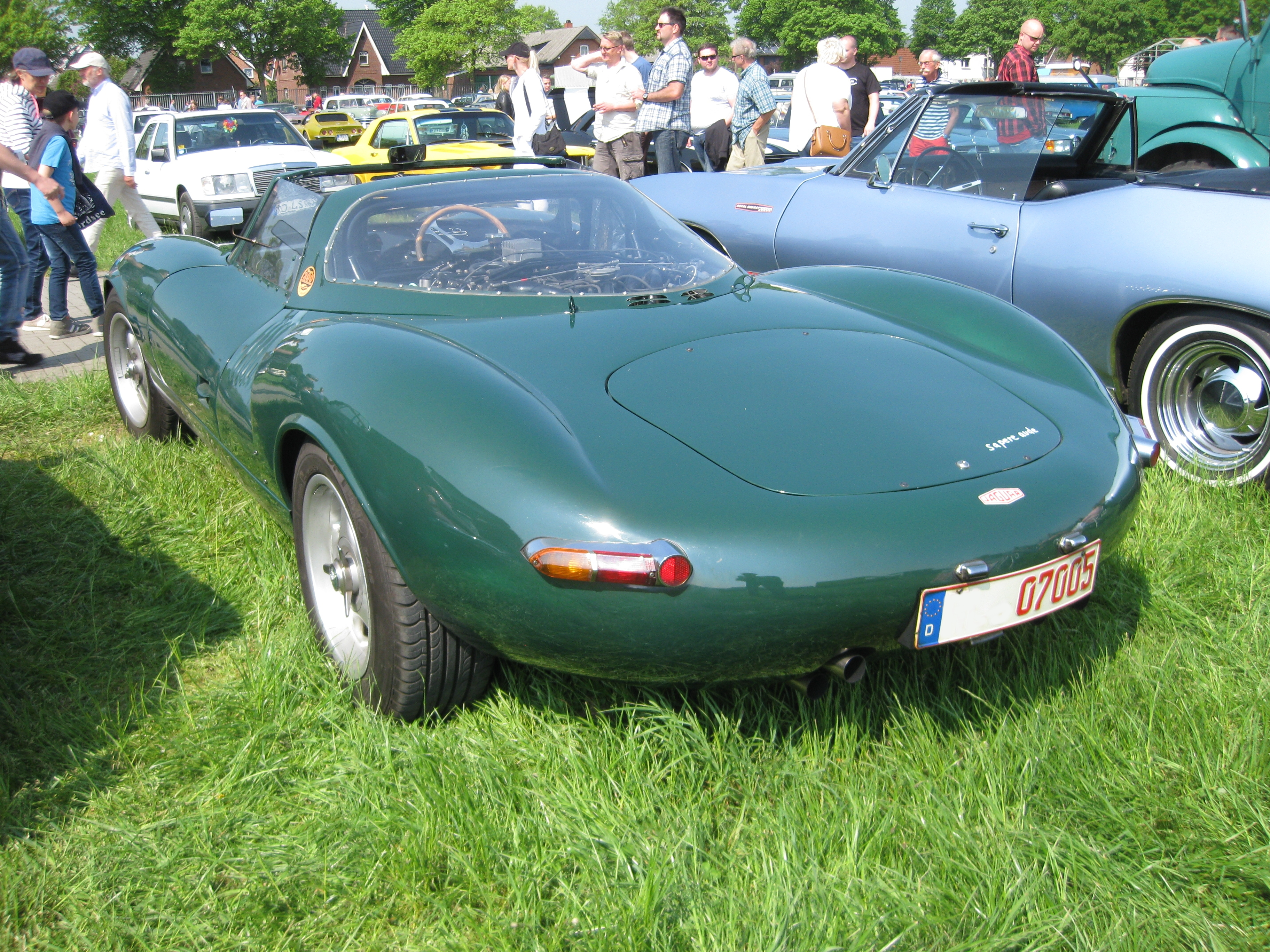 Jaguar XJ 13 Replika